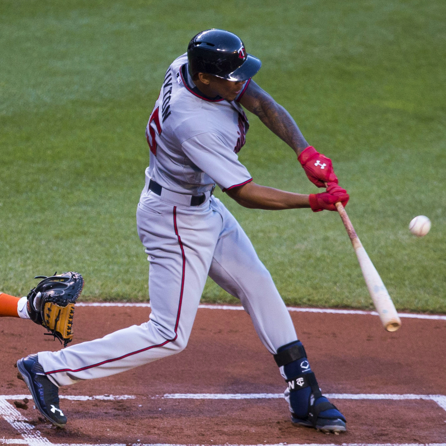 Byron Buxton